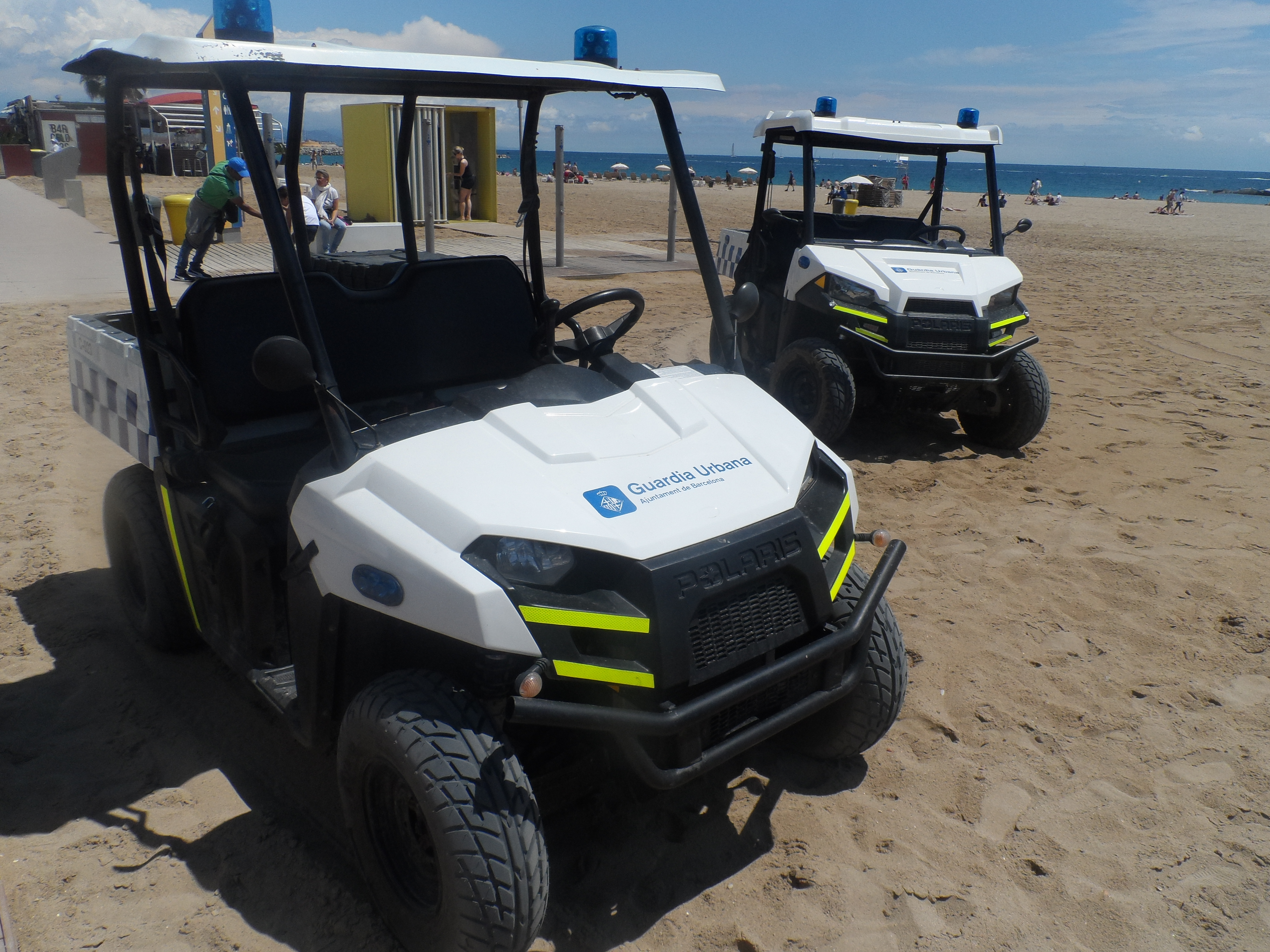 Police dune buggies, Barcelona